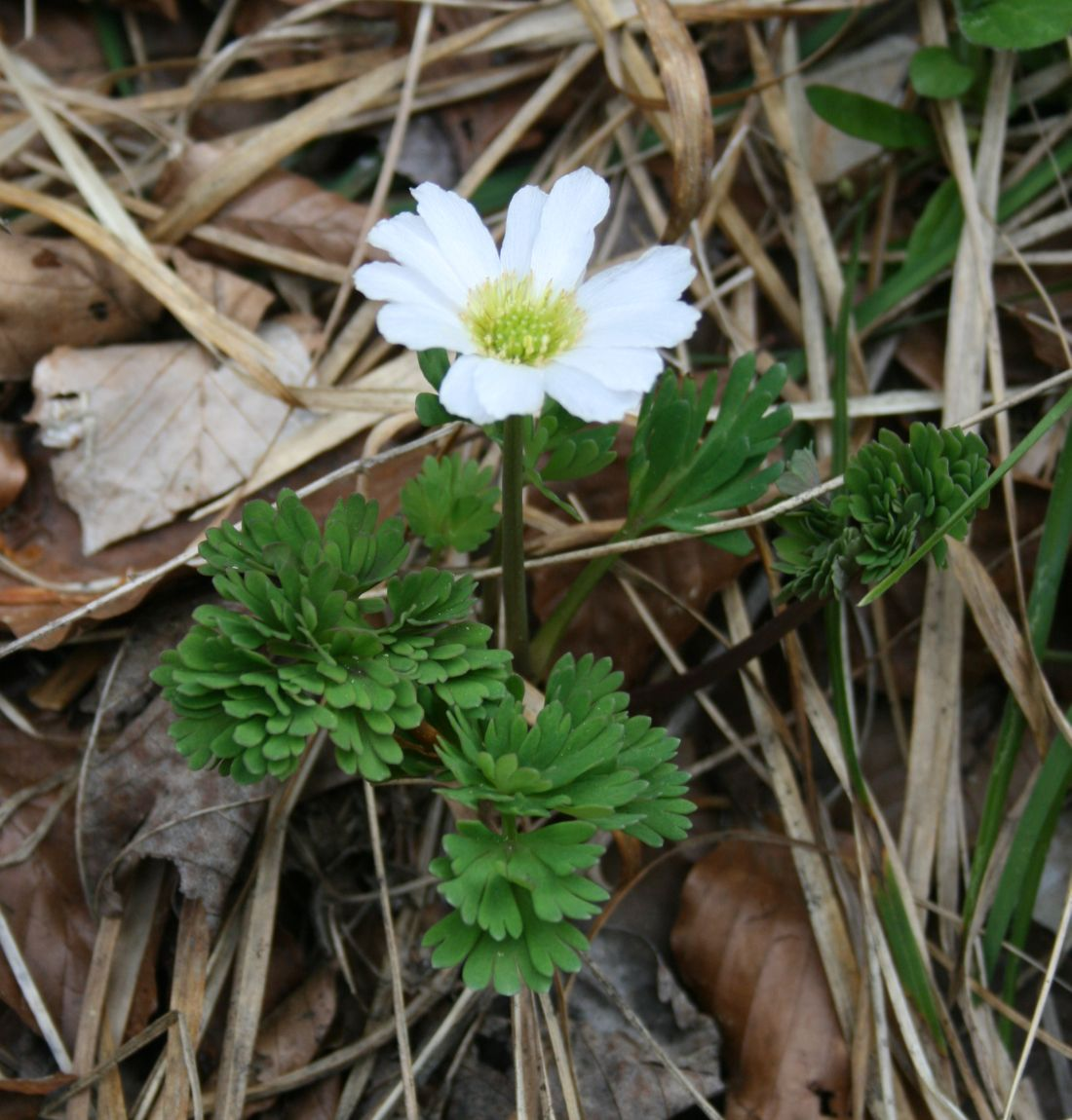 Windröschen-Schmuckblümchen (Callianthemum anemonoides), Hahnenfußgewächse (Ranunculaceae) - Österreich/Austria/Autriche: Steiermark, Ennstaler Alpen, Spitzenbachgraben W St. Gallen